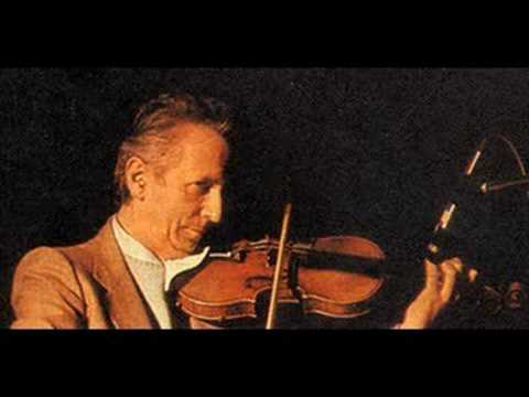 Giusto Pio nel 1982 fonte: youtube